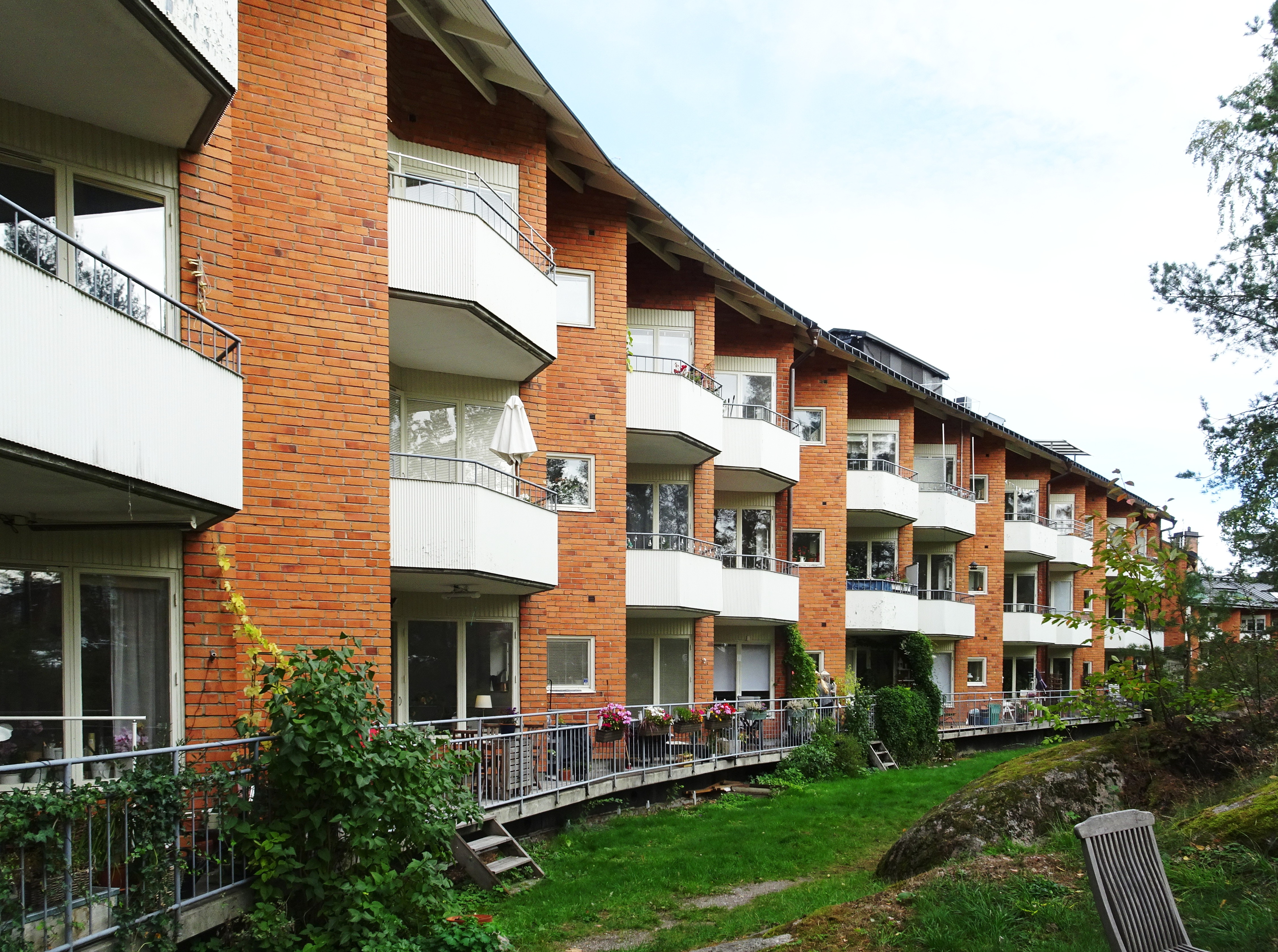 Nockeby familjehotell vid Gubbkärrsvägen 29, arkitekt Backström & Reinius, 1950